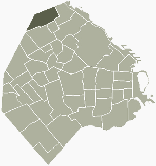 Barrio de Saavedra